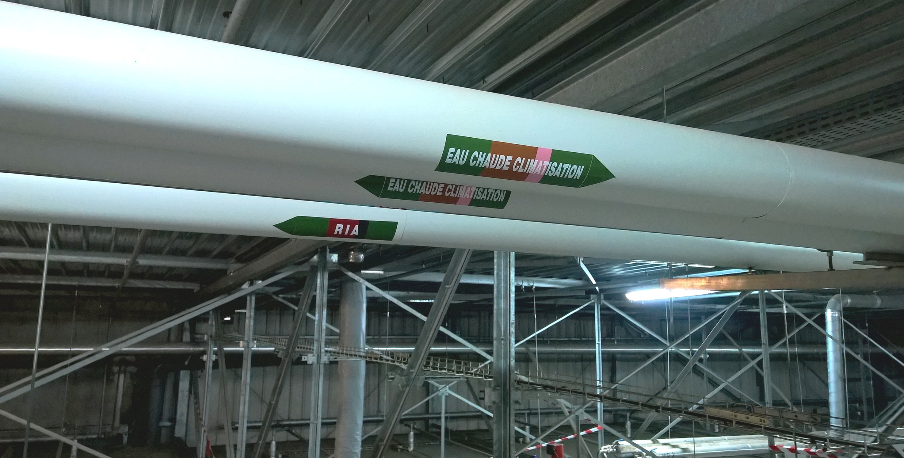 Utilité , calorifuge, fluides généraux